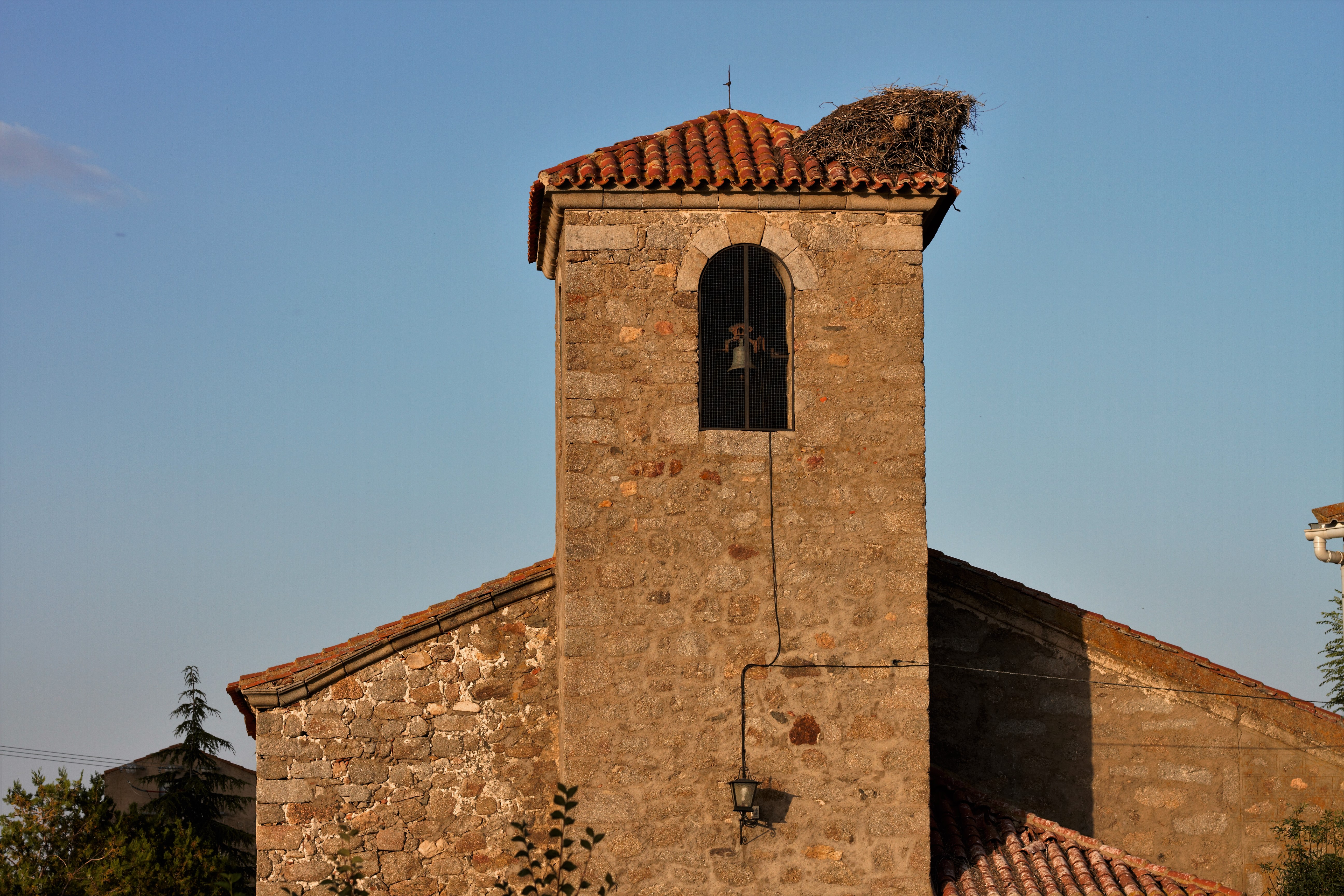 Campanario Iglesia Muñotello